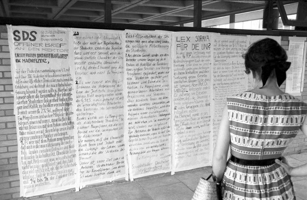 Offener Brief des Sozialistischen Deutschen Studentenbundes (SDS) an den Rektor.